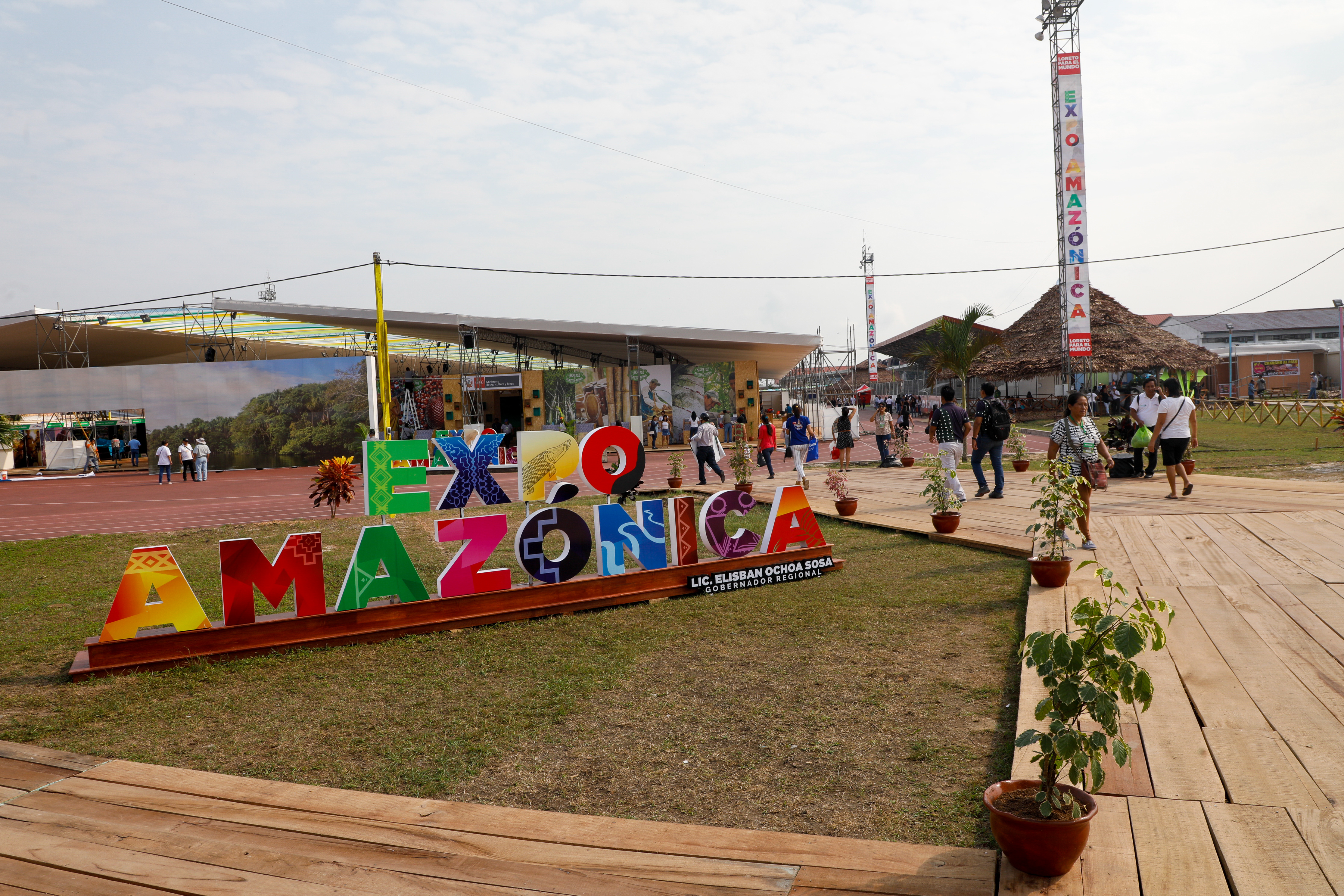 ExpoAmazónica 2019 Iquitos, visita de Martín Vizcarra a Loreto, foto del Ministerio de la Producción.